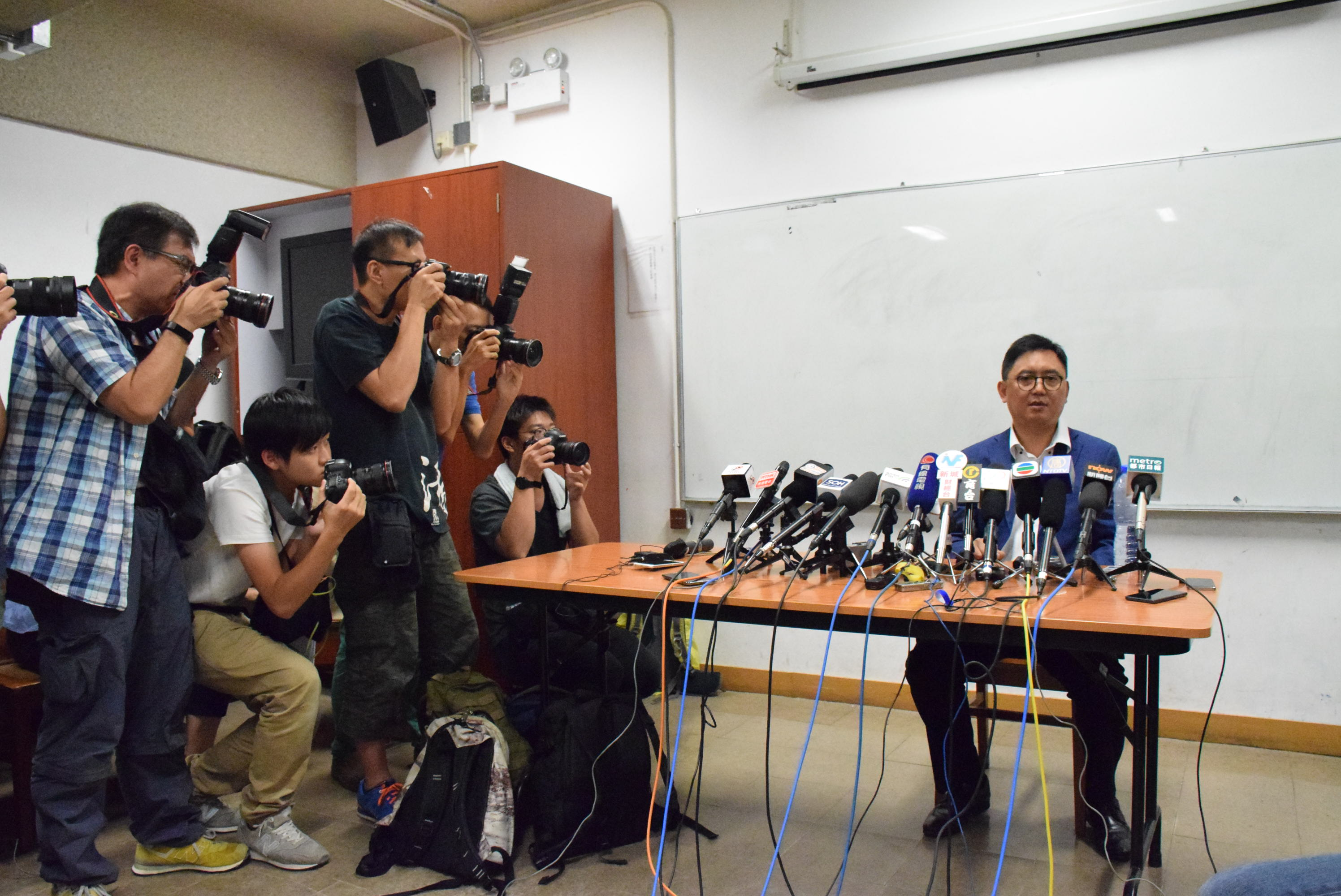 大批傳媒採訪周永勤記者會(美國之音湯惠芸拍攝)